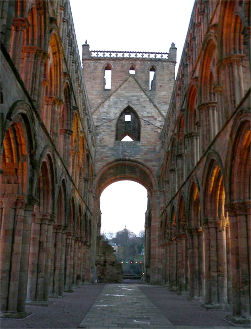 Jedburgh Abbey, interior